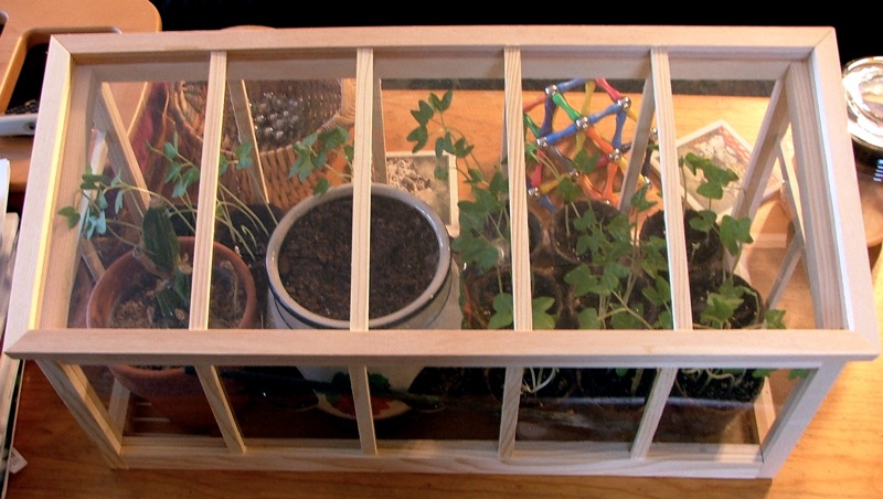 Mini indoor greenhouse